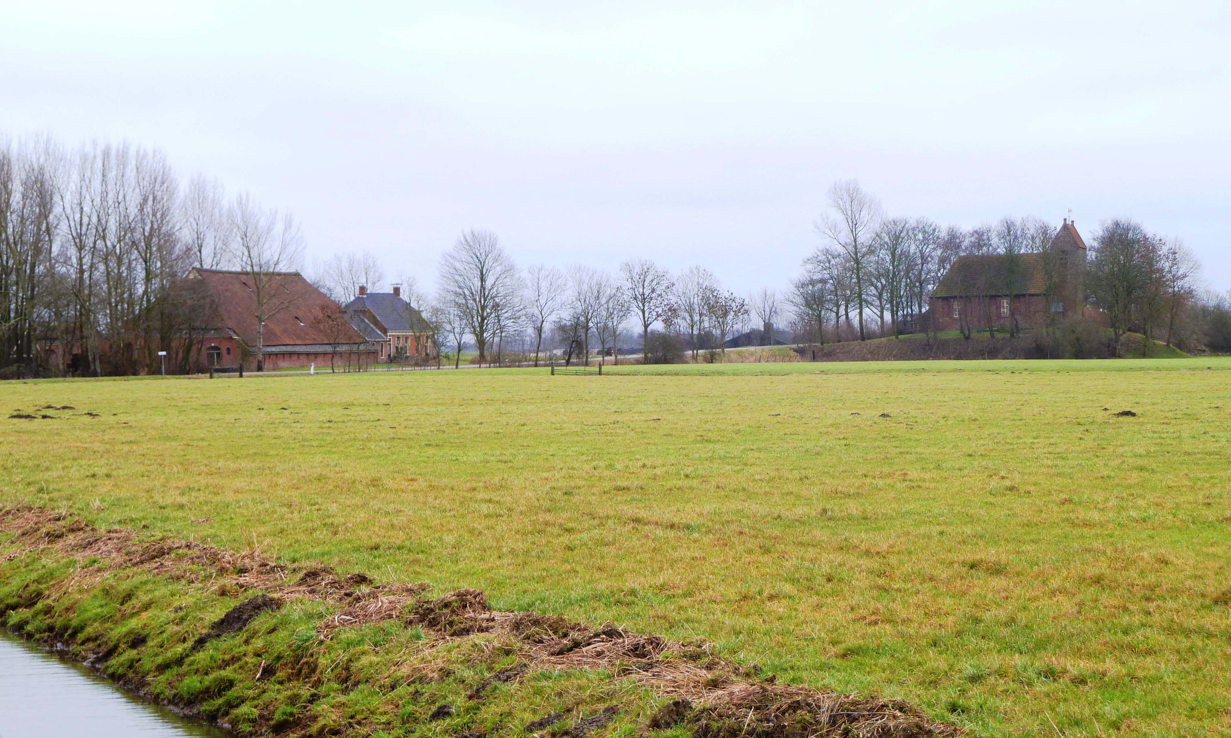 De wierde van Oostum (rm 522145), gezien vanuit het noorden, 2011. Links de boerderij Reinghes Stede, rechts de kerk van Oostum